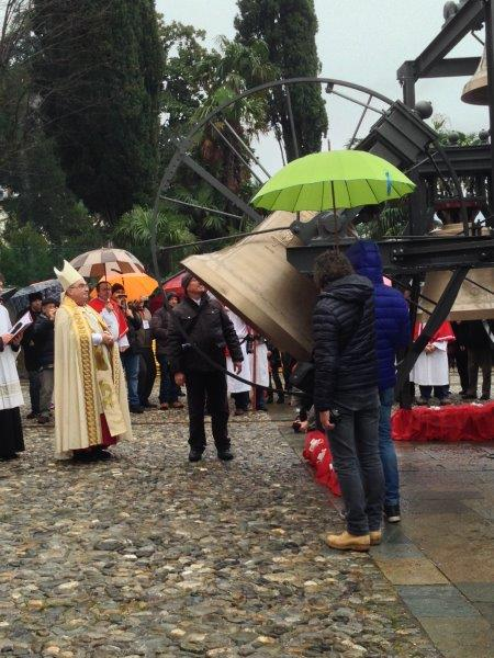 Momento della benedizione delle nuove campane di San Giovanni in Bellagio alla presenza del vescovo di Como Mons.Diego Coletti